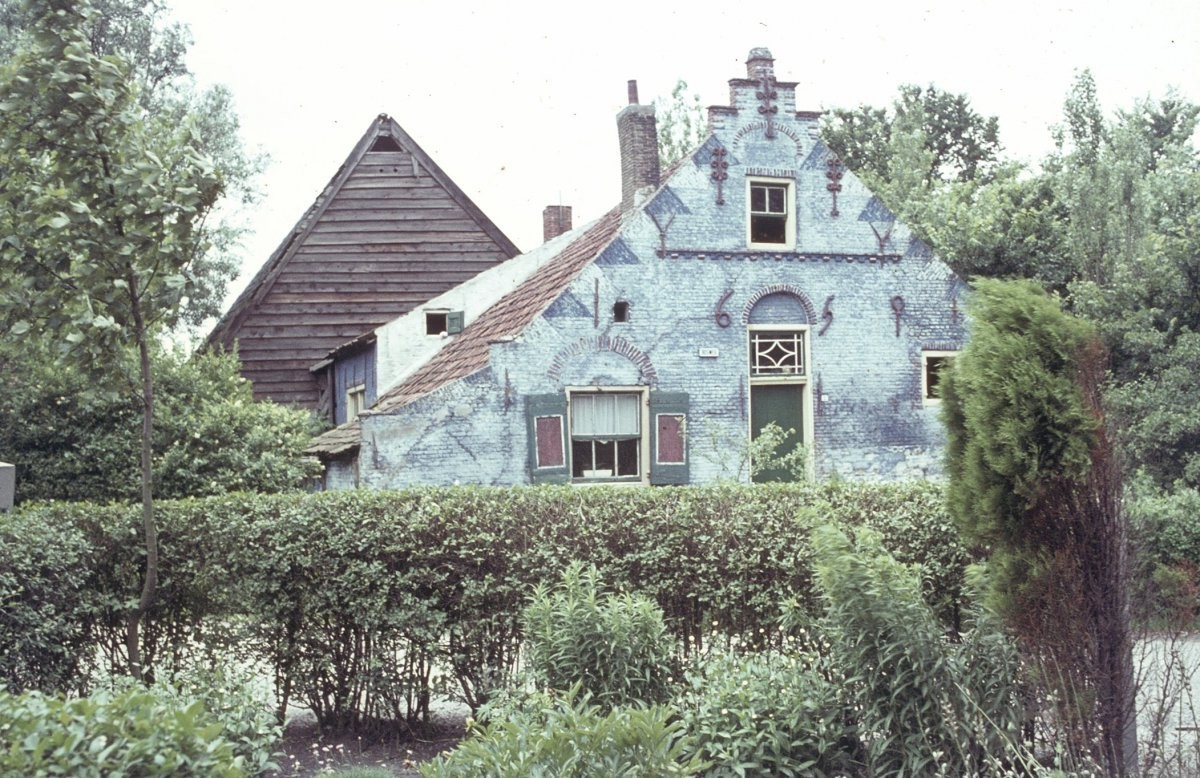 HET BLAUWE HUIS: Exterieur OVERZICHT VOORGEVEL